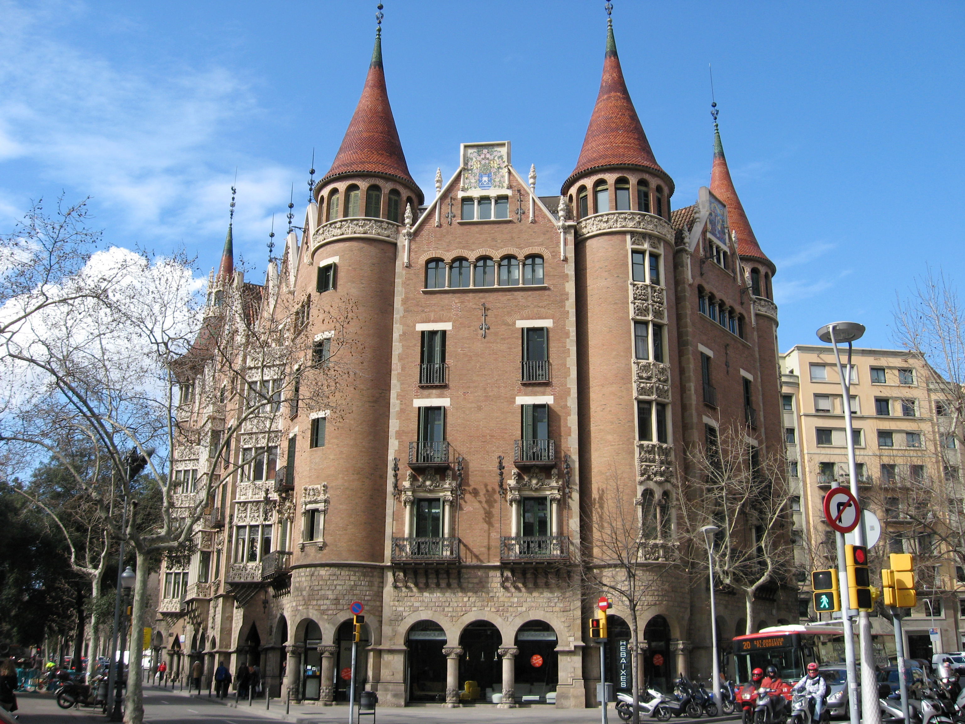 Casa de les Punxes